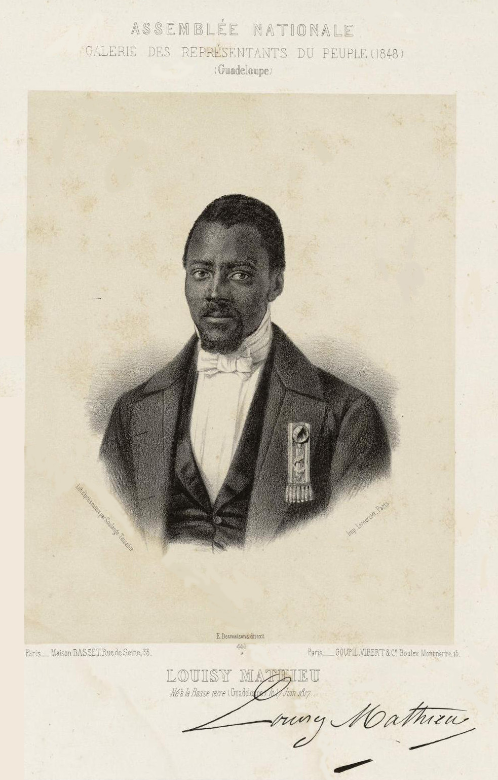 Assemblée Nationale, Galerie de représentants du peuple (1848) (Guadeloupe) : Louisy Mathieu né à la Basse terre (Guadeloupe) le 17 juin 1817.